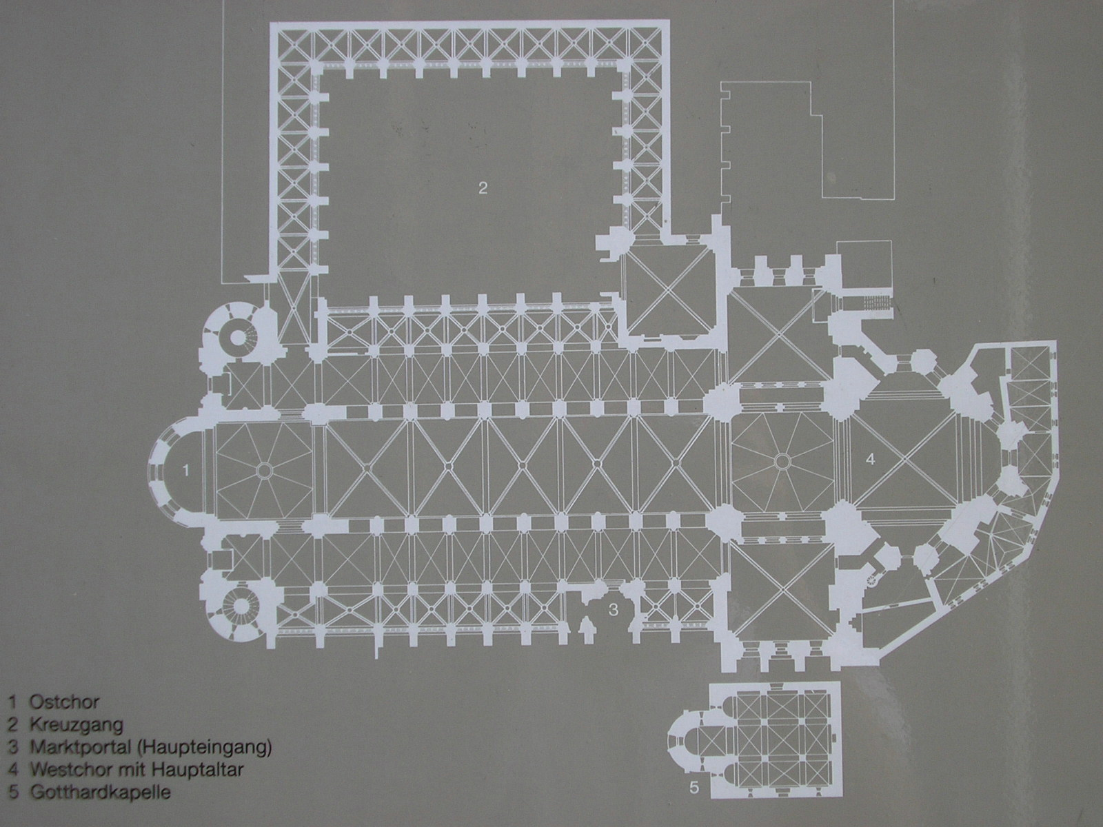 Grundriss des Mainzer Doms Wie zu erkennen ist, handelt es sich nicht um eine eingenordete, sondern eingesüdete Zeichnung. Links daher der Ostchor, der von den Treppentürmen des Willigis flankiert wird. Das Mittelschiff erscheint durch die beidseits angebauten Kapellenreihen fünfschiffig, unterbrochen im Süden (oben) von der Memorienkapelle und im Norden durch das Marktportal. Der Chorabschluss des Westchores lässt den im Artikel Mainzer Dom beschriebenen Trikonchos deutlich werden.